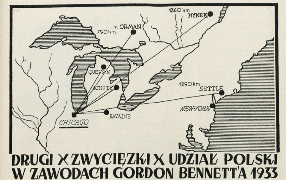 Mapka pokazująca wyniki poszczególnych balonów podczas XXI Gordon Bennet Cup 1933.